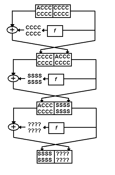 Схема, показывающая принцип работы интегрального криптоанализа